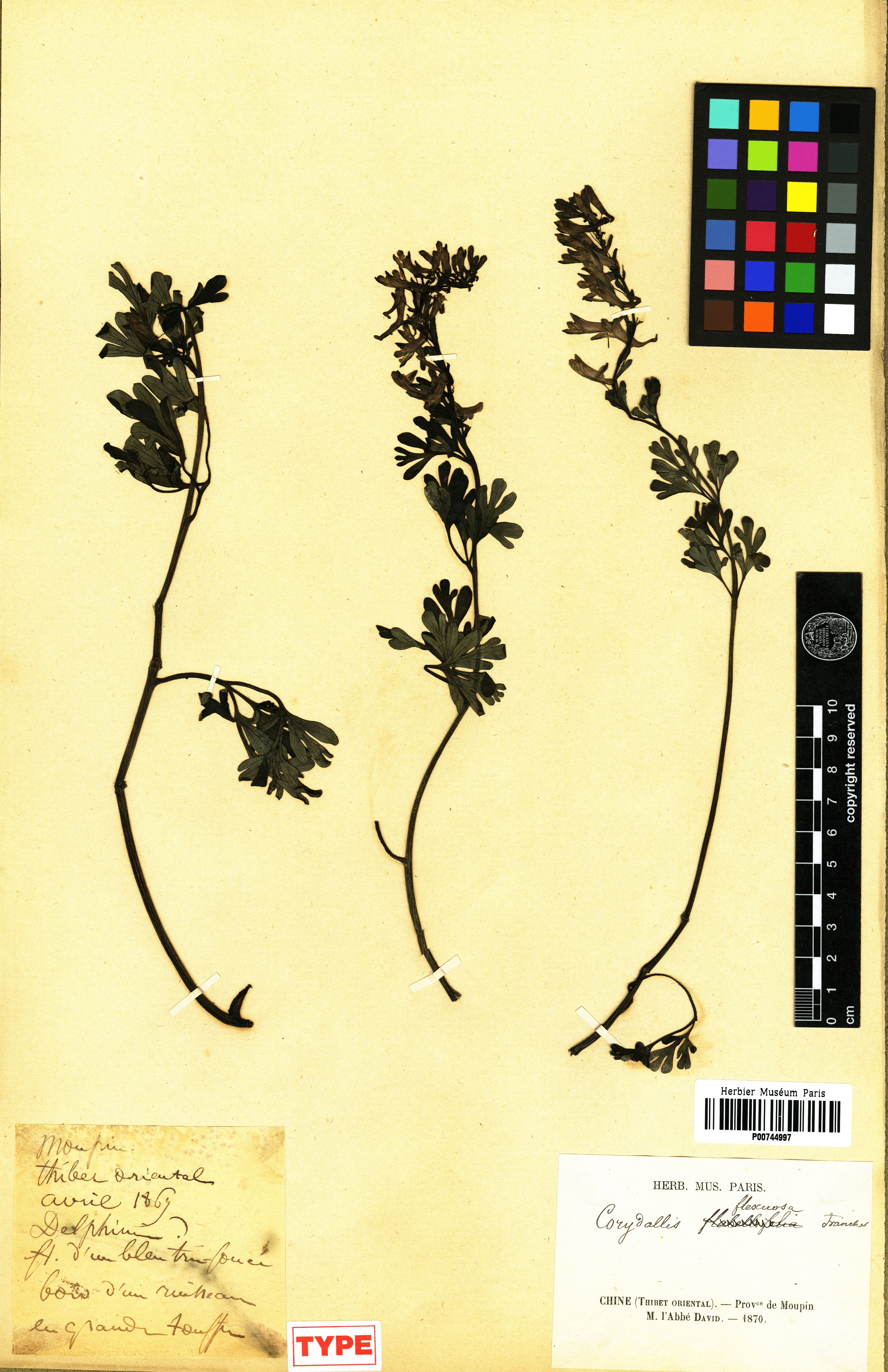 Type; Muséum national d’Histoire naturelle, Paris (France) Collection : Plantes vasculaires (P) Spécimen P00744997